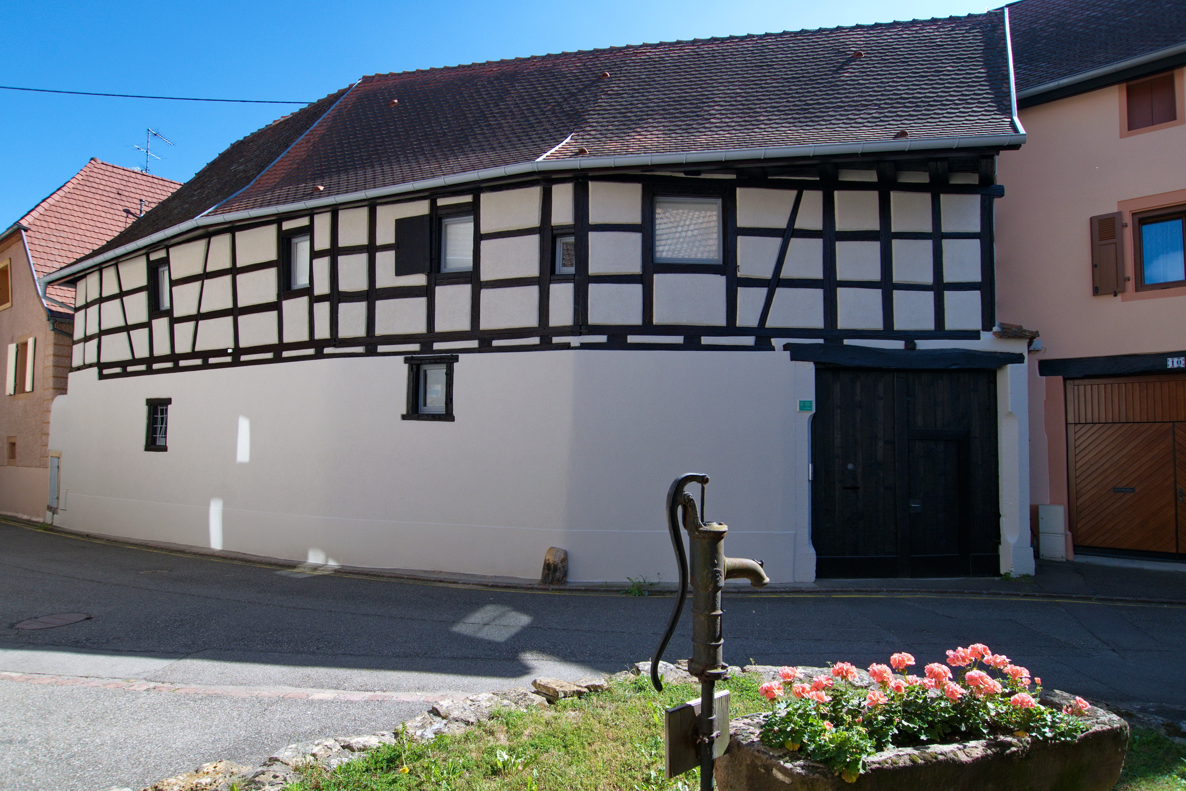 Synagogue, 8 rue Ullin (Classé, 1921). Le bâtiment de la synagogue se trouve dans la cour de l'immeuble photographié et n'est pas visible depuis la rue. Une plaque à gauche du portail indique qu'il se trouve bien à cette adresse.